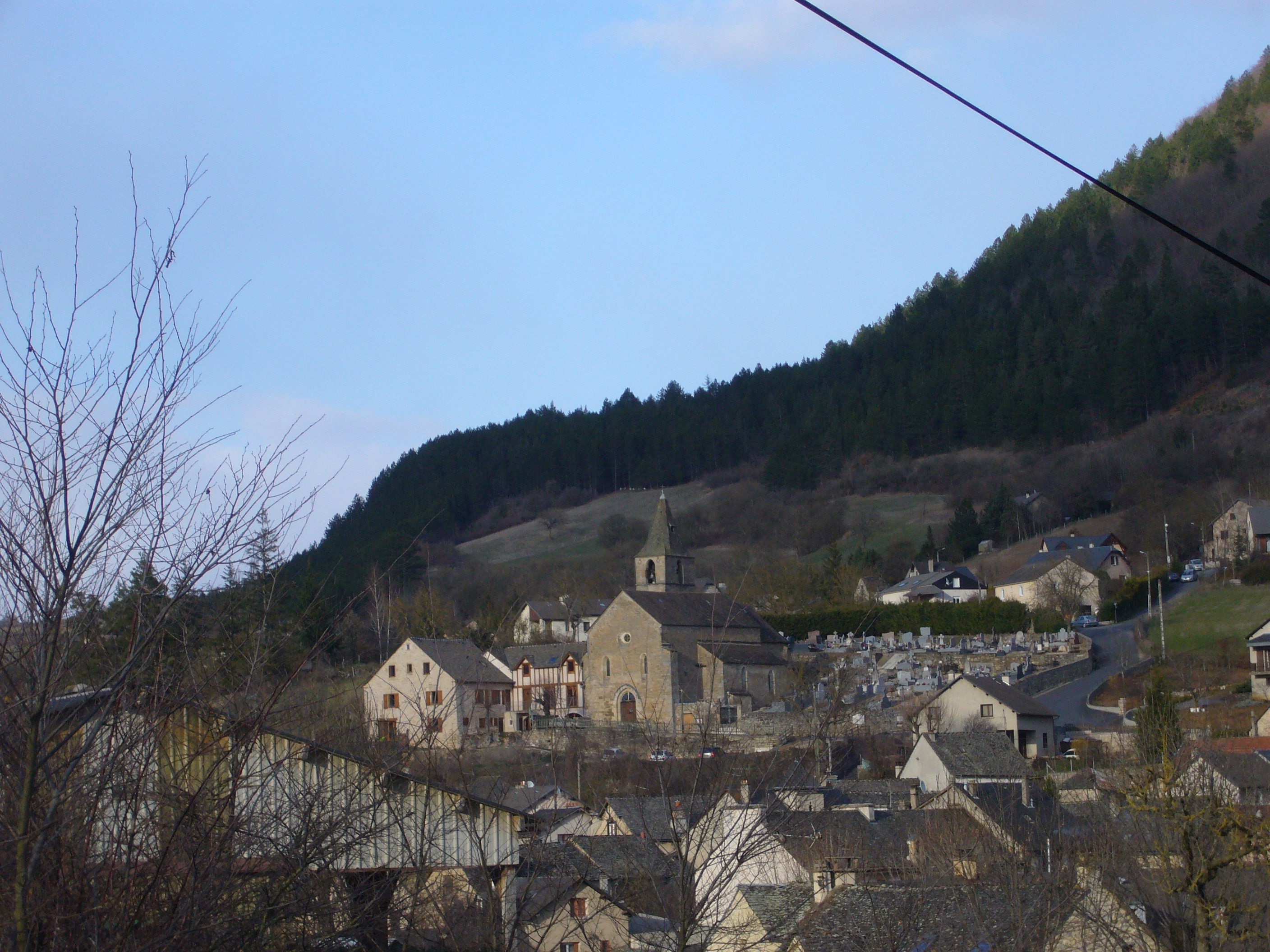 Vue générale de la commune de Barjac (Lozère, France)